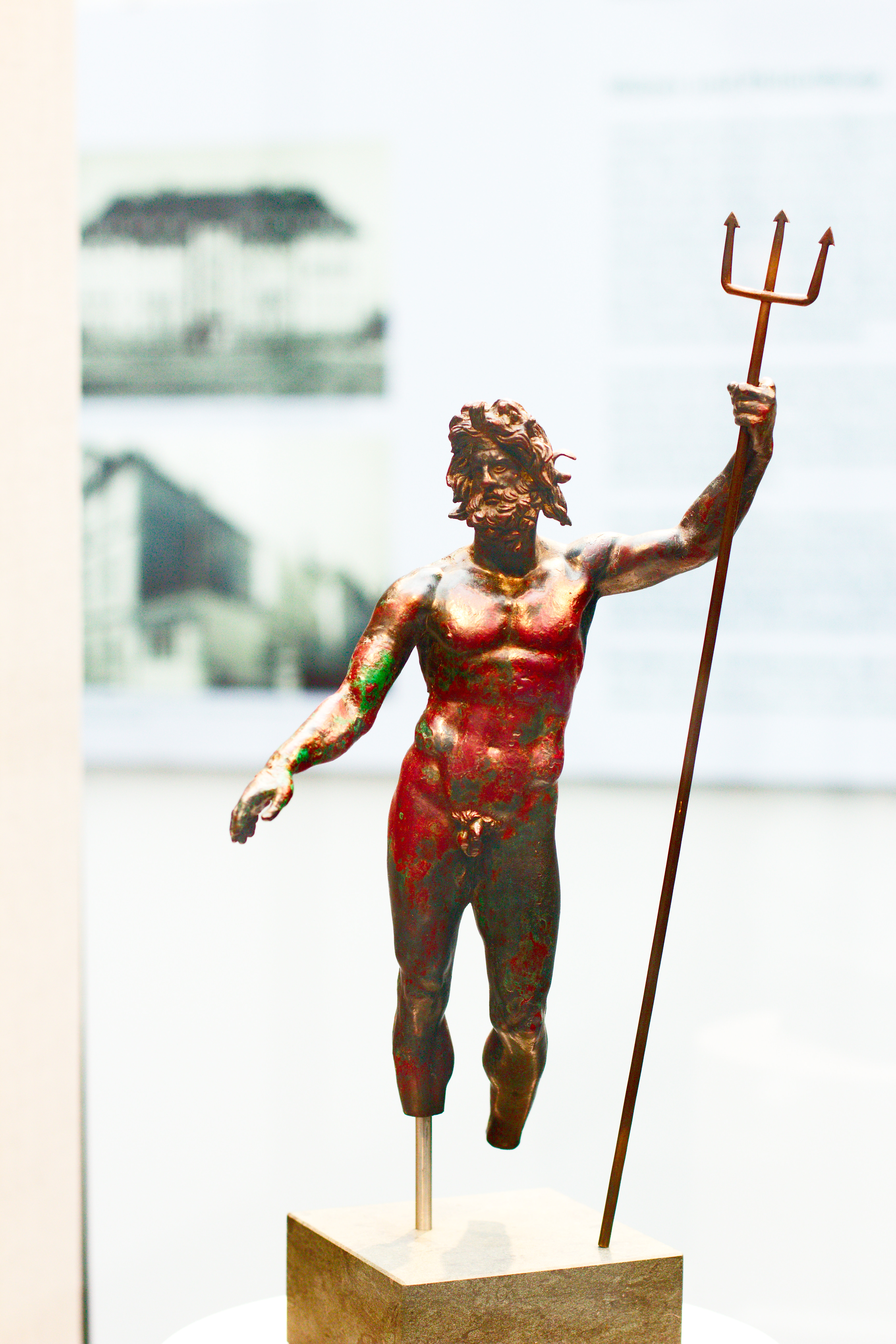 Poseidon mit Schilfkranz und Dreizack (moderne Ergänzung) .